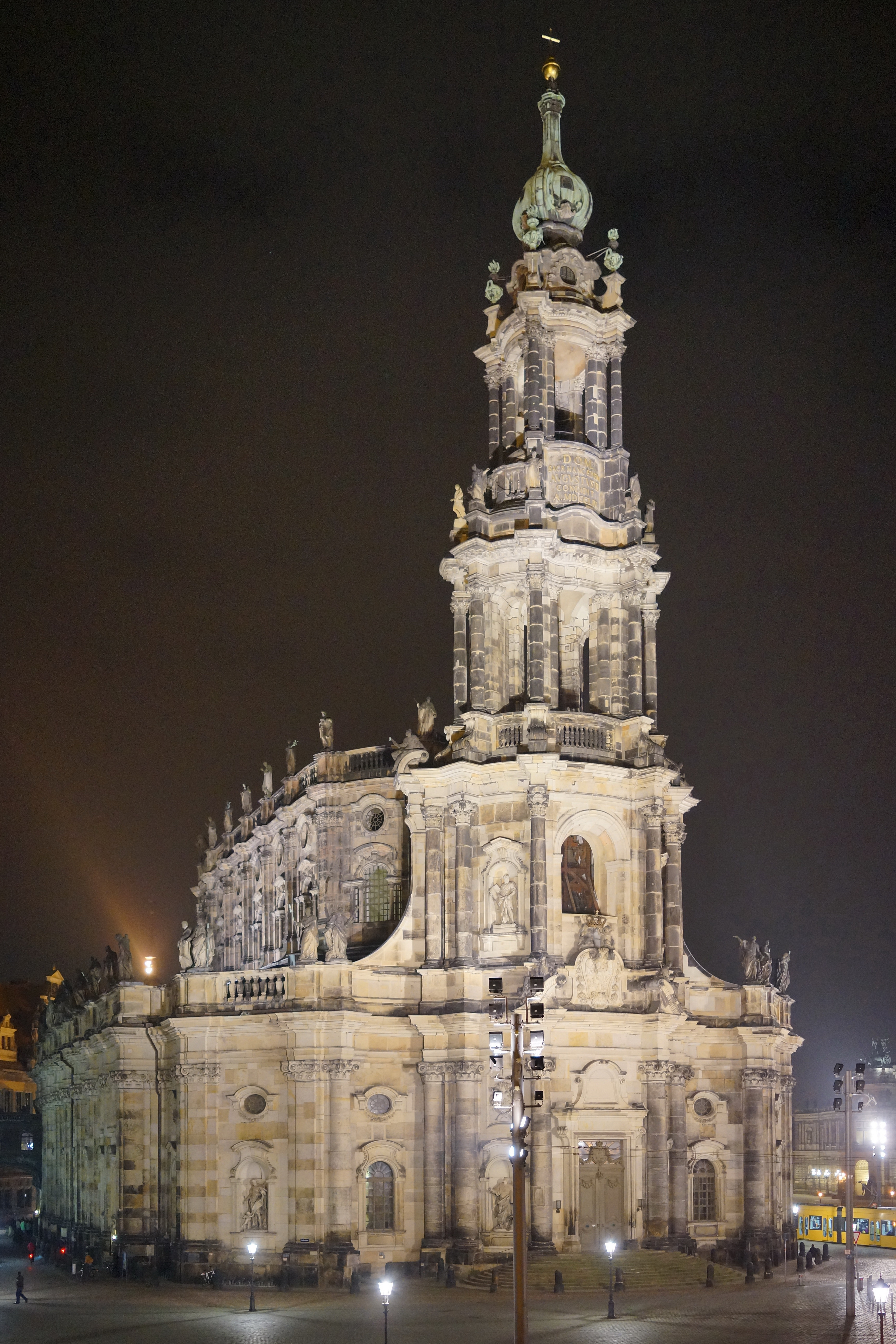 von den Stufen der Elbterrasse